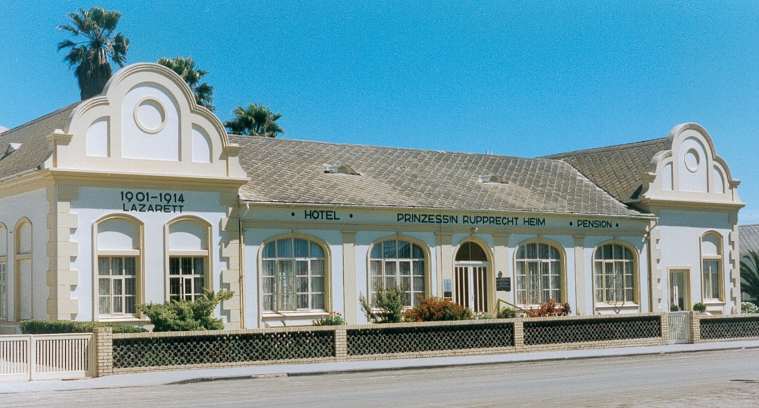 Ehemaliges Prinzessin Rupprecht Heim; heute ein Hotel